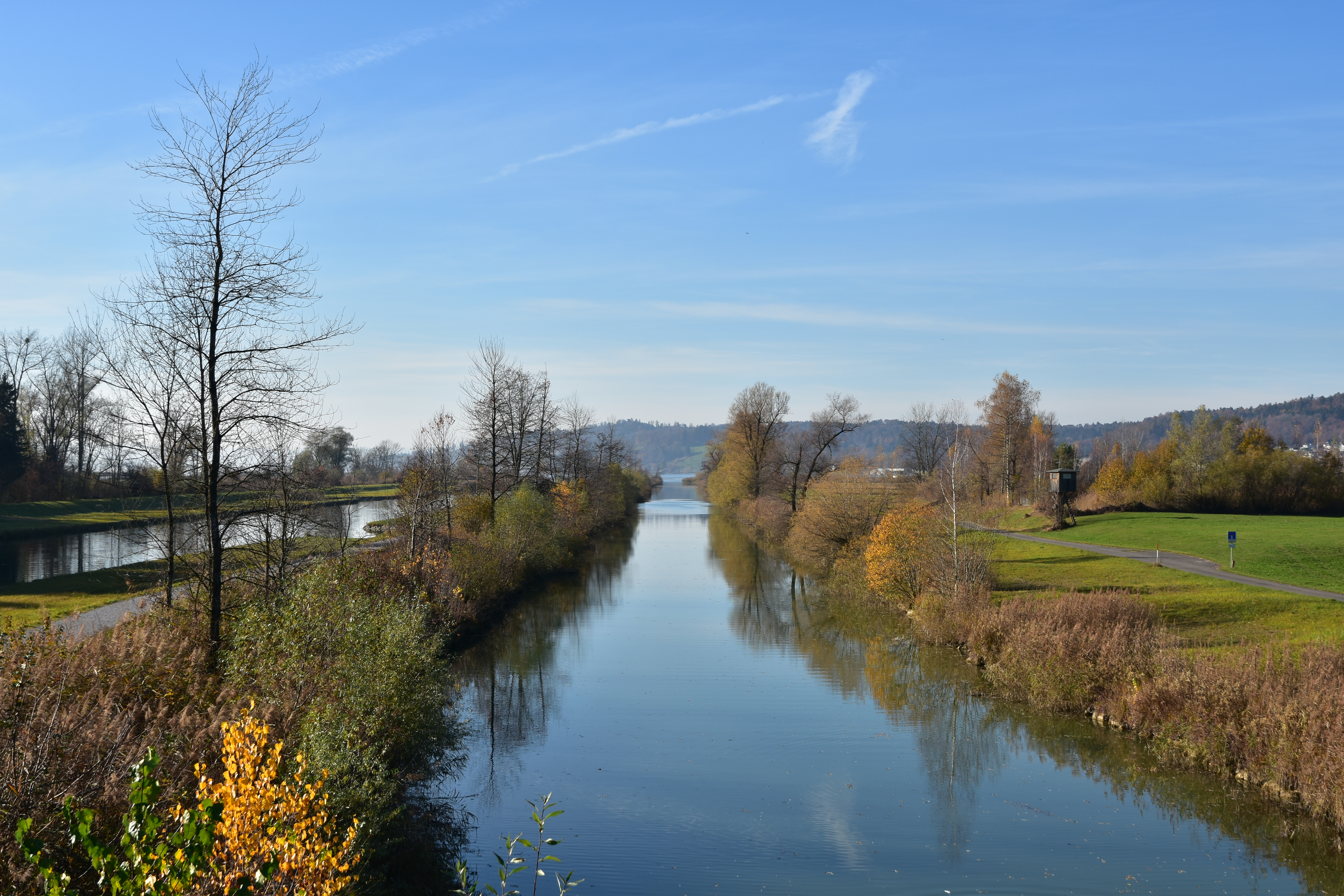 Schmerikoner Ried on Obersee lake shore (Switzerland)